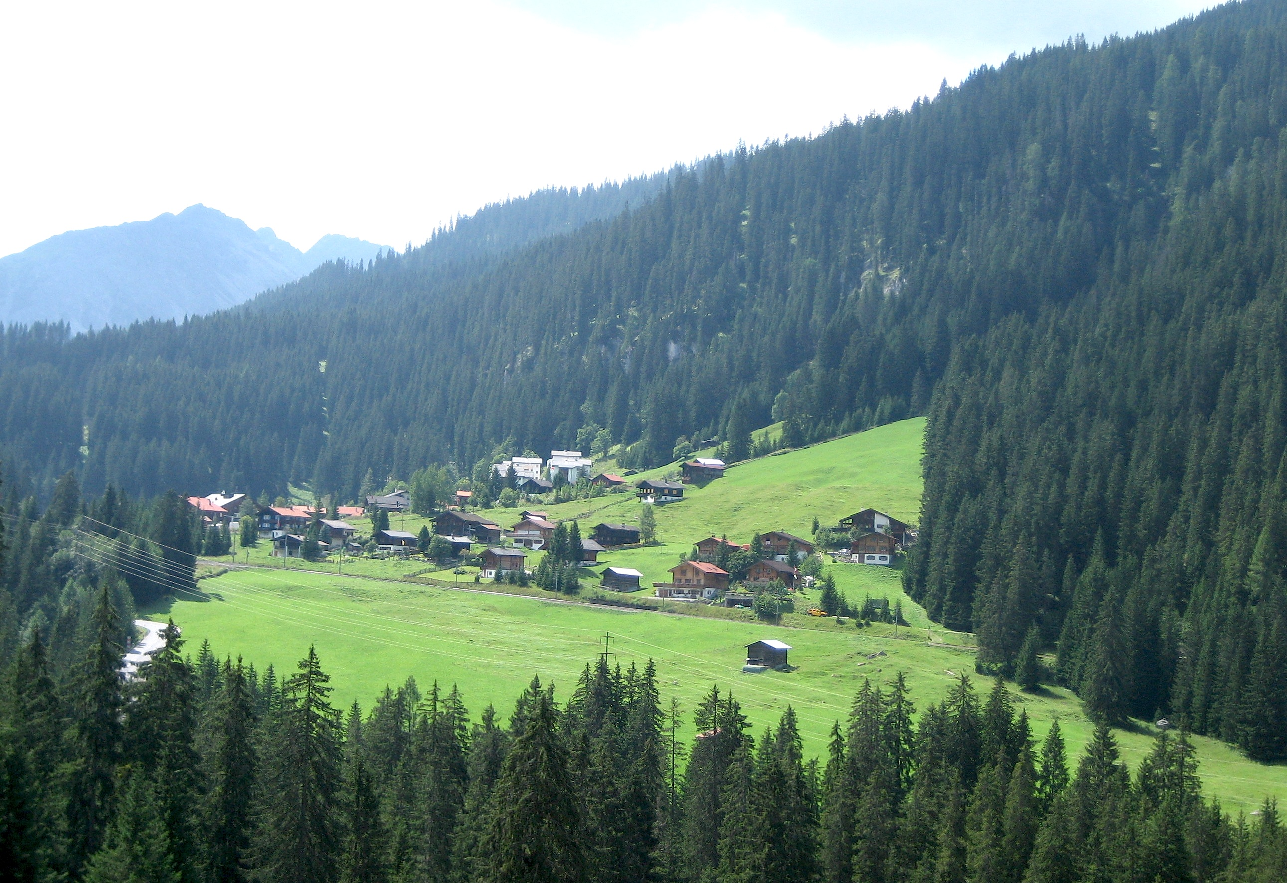 Litzirüti